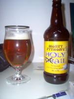 Categorie:Afbeelding bier